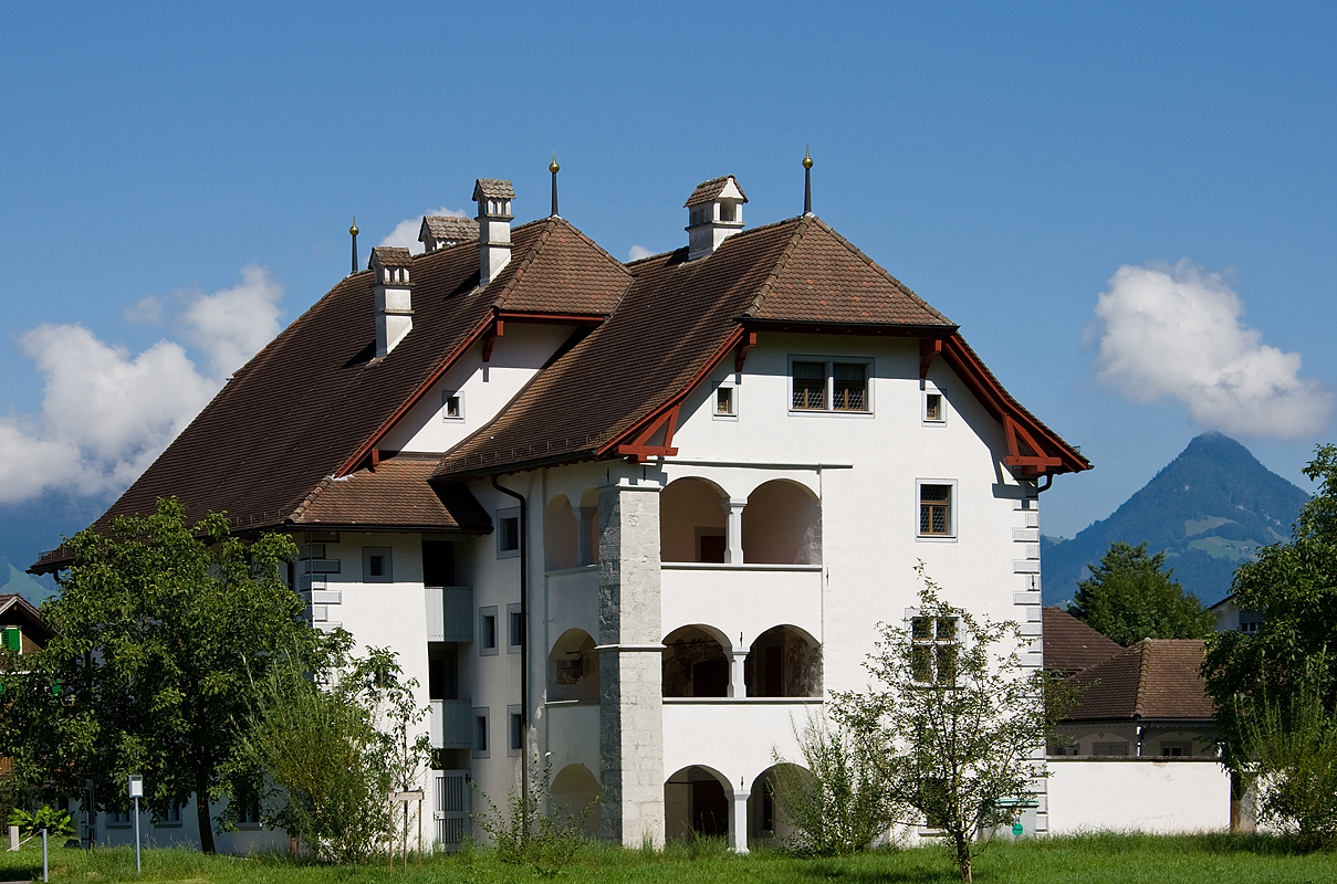 Winkelriedhaus aus dem 15. Jh. in Stans. Einst Haus vom Ritter Melchior Lussy. Heute Museum für Kultur und Brauchtum.